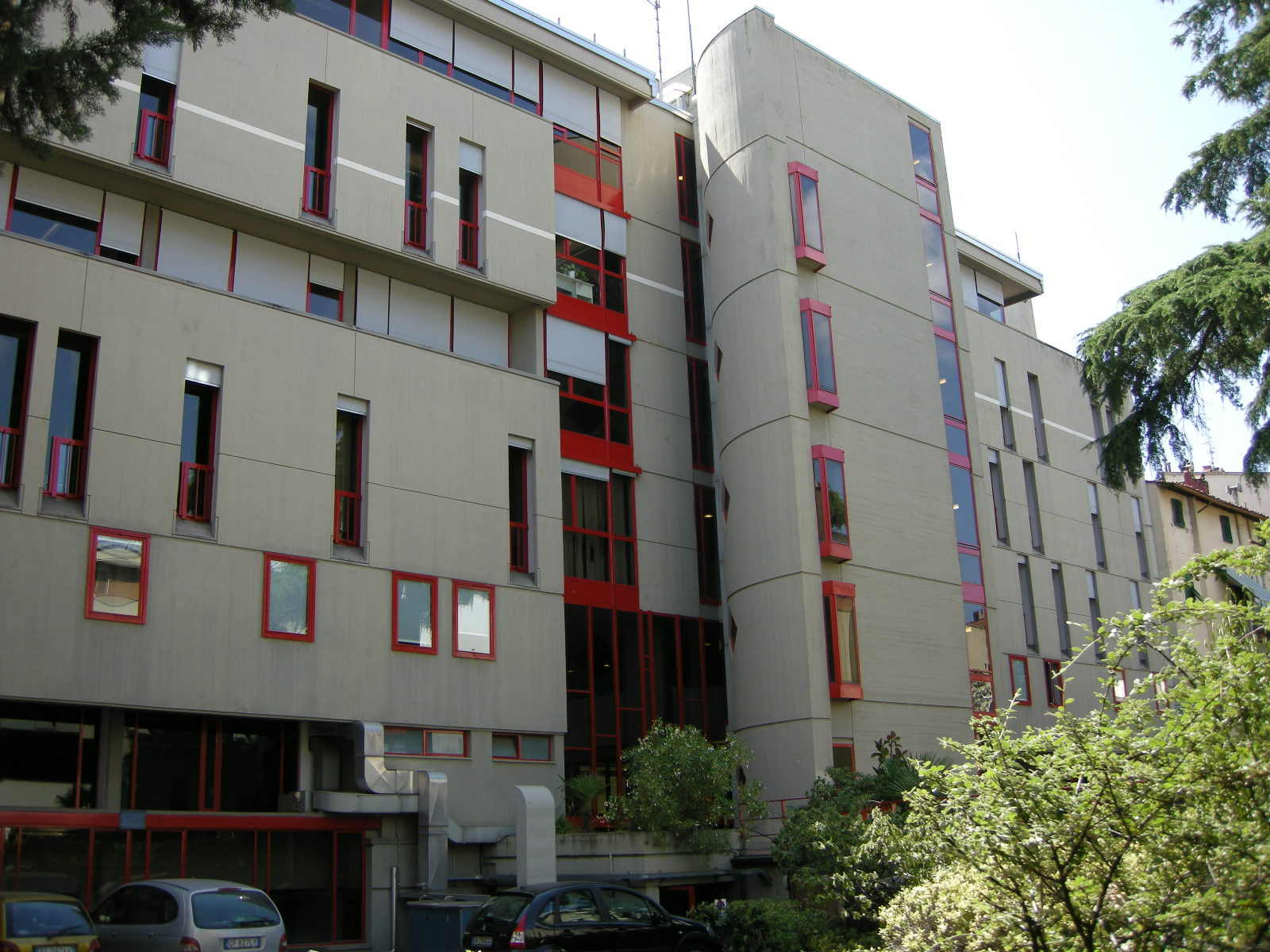 Ex sede della nuova italia